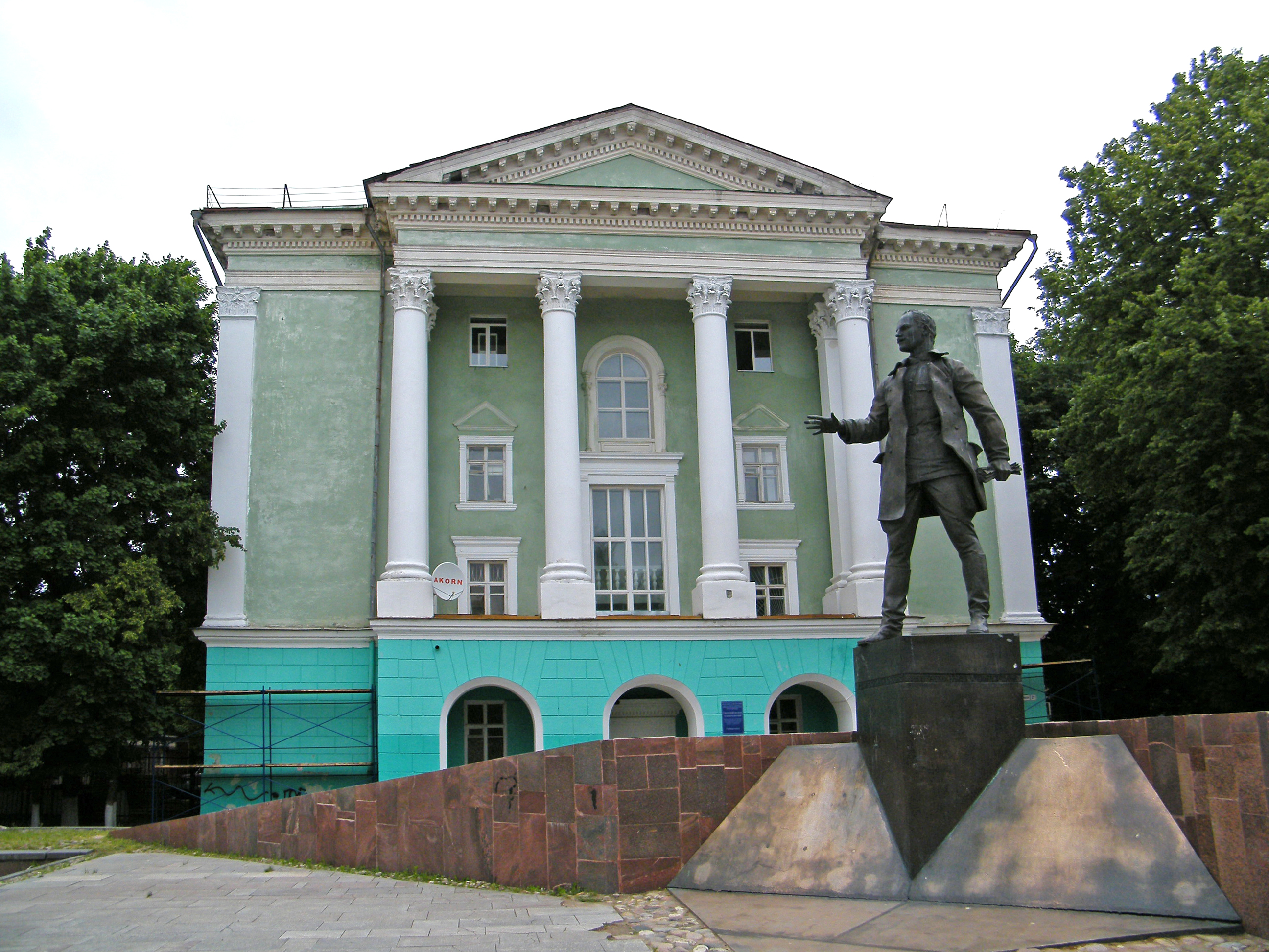 Колледж телекоммуникаций